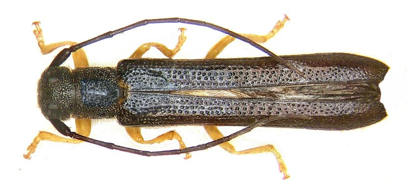 Familie: Cerambycidae Grösse: 11-14.5 mm Verbreitung: Europa Ökologie: Entwicklung in Haselästen Fundort: Germania, Bayern, Oberfranken, Kulmbach leg.det. U.Schmidt, 1972 Foto: U.Schmidt, 2005